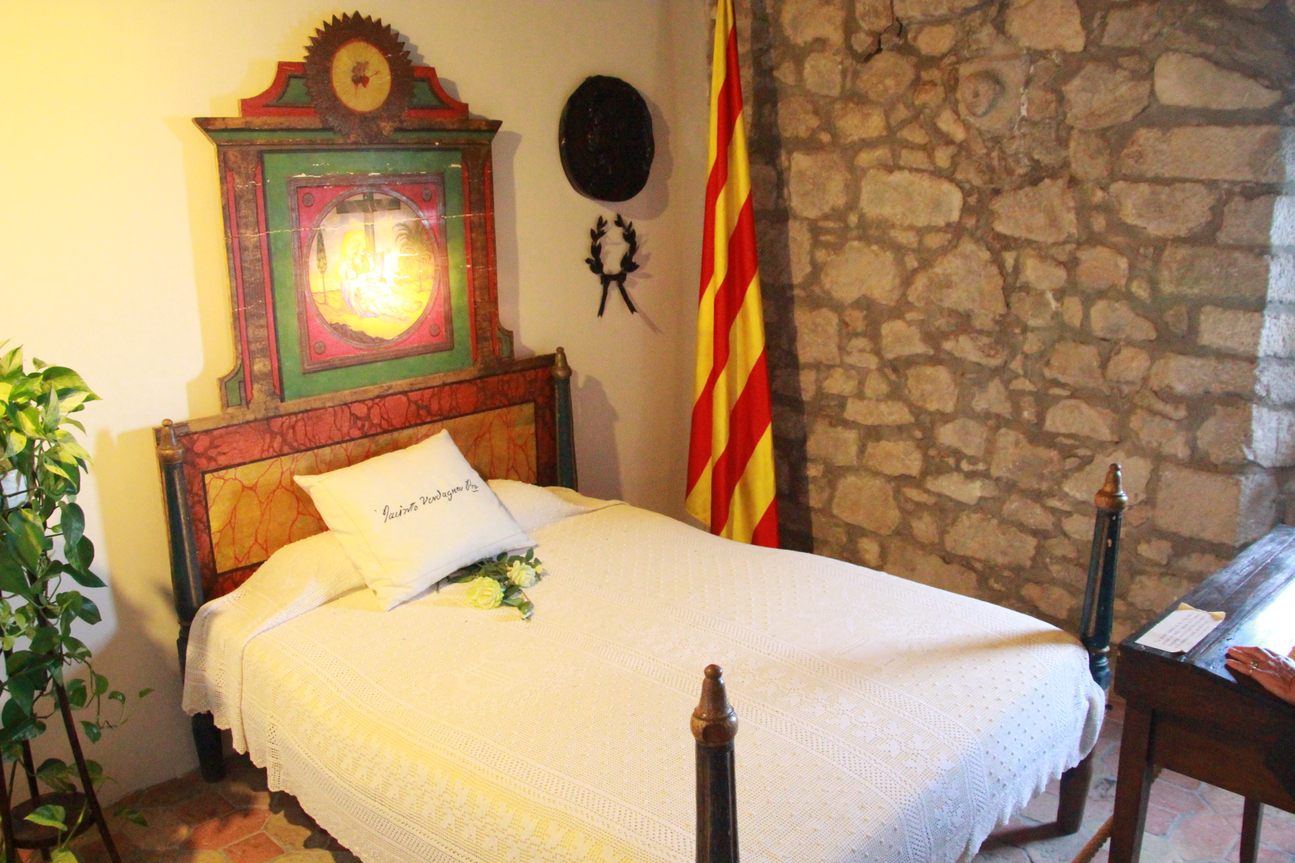 Santuari la Mare de Déu del Mont (Albanyà)